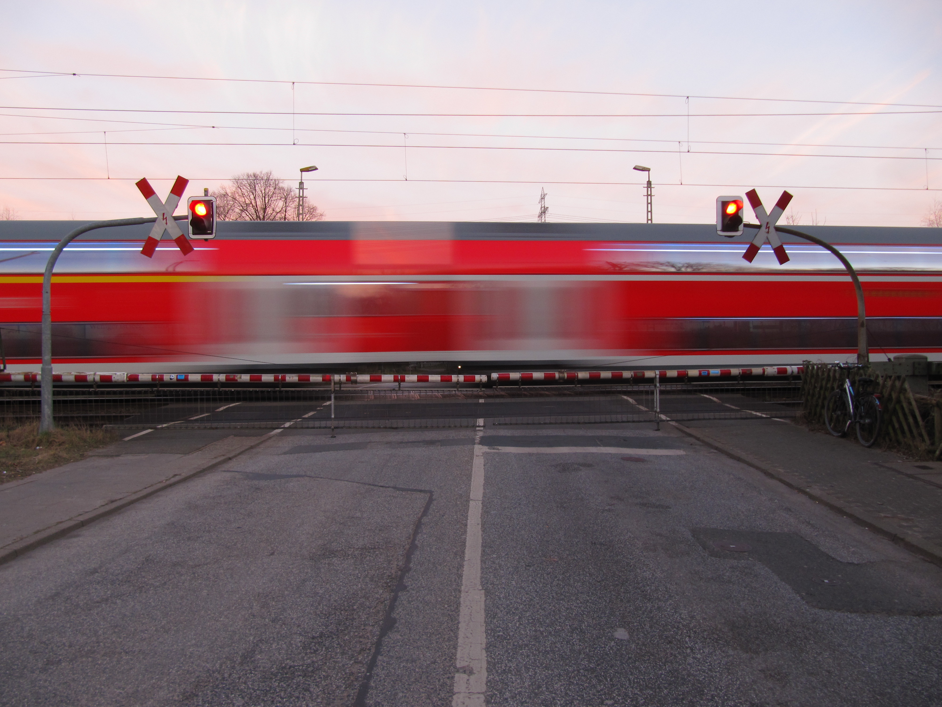 Bahnübergang der Regionalbahn Richtung Ahrensburg und Lübeck in Hamburg-Wandsbek.